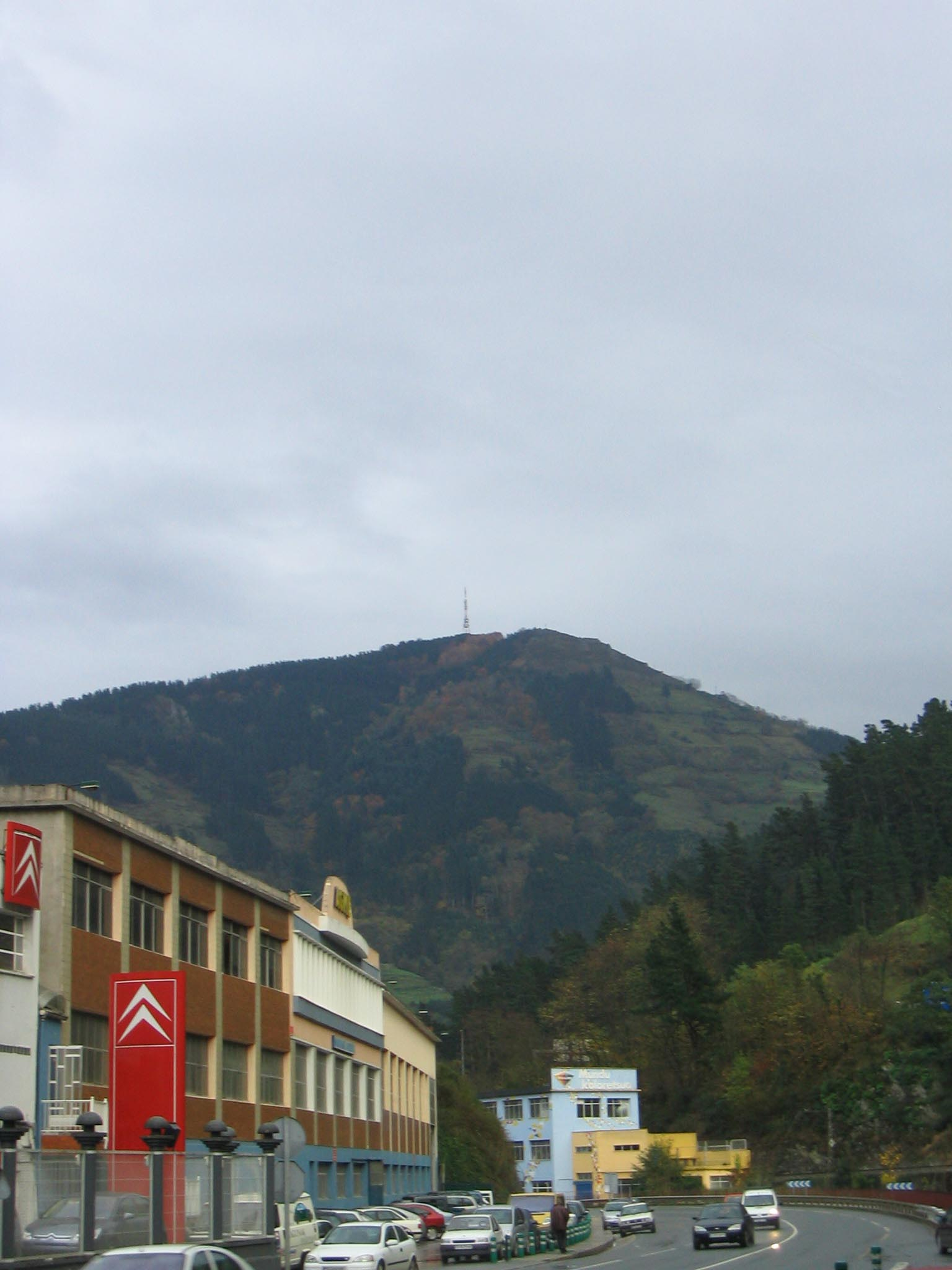 Vista del monte Karakate, Guipúzcoa, País Vasco, España.